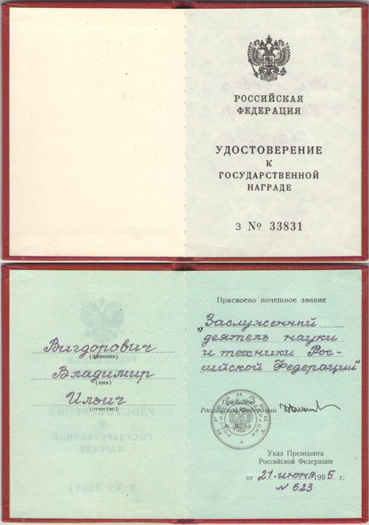 Удостоверение к государственной награде выдано 25 июня 1995 года